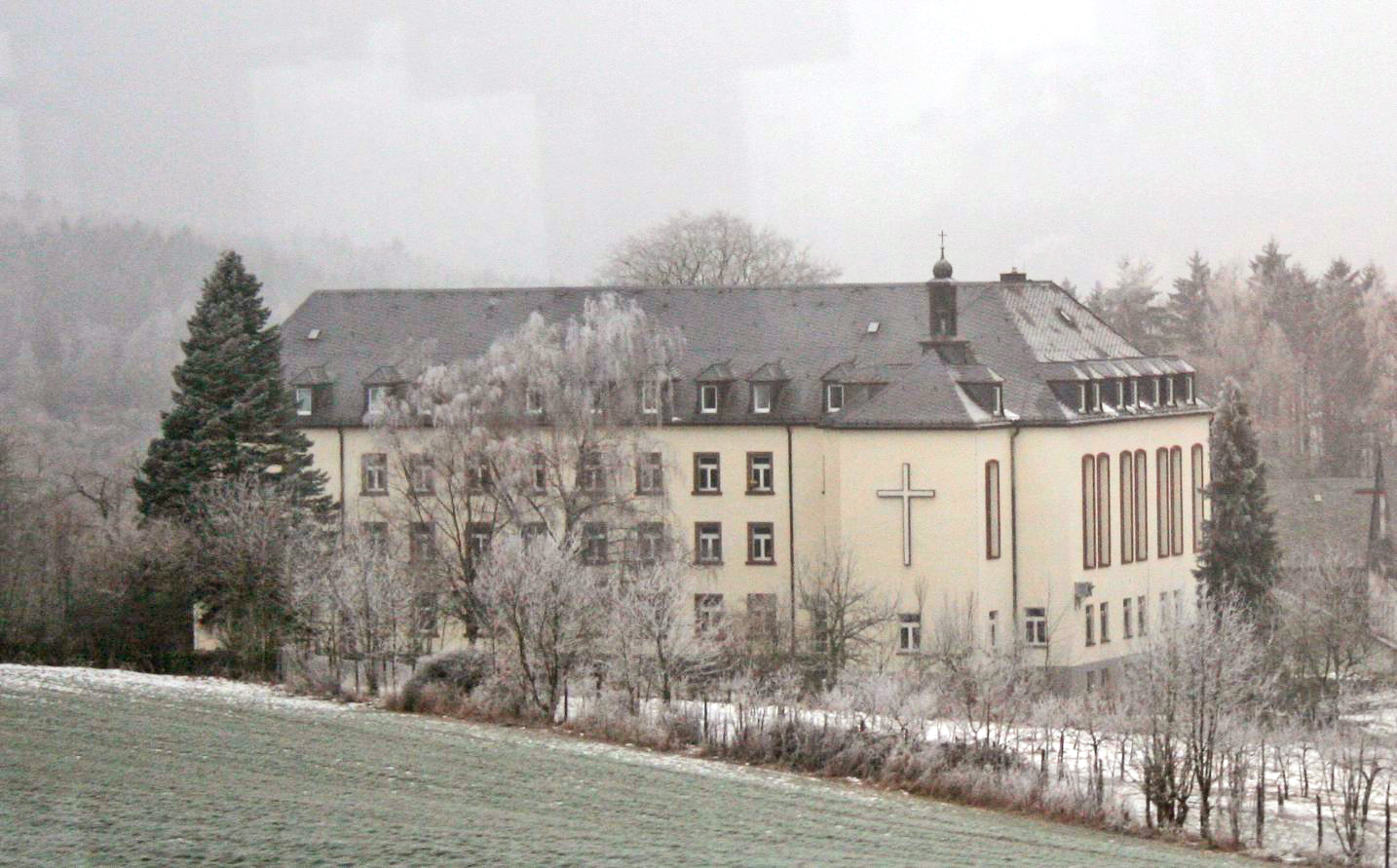 Klouschter vu Maria Martental.